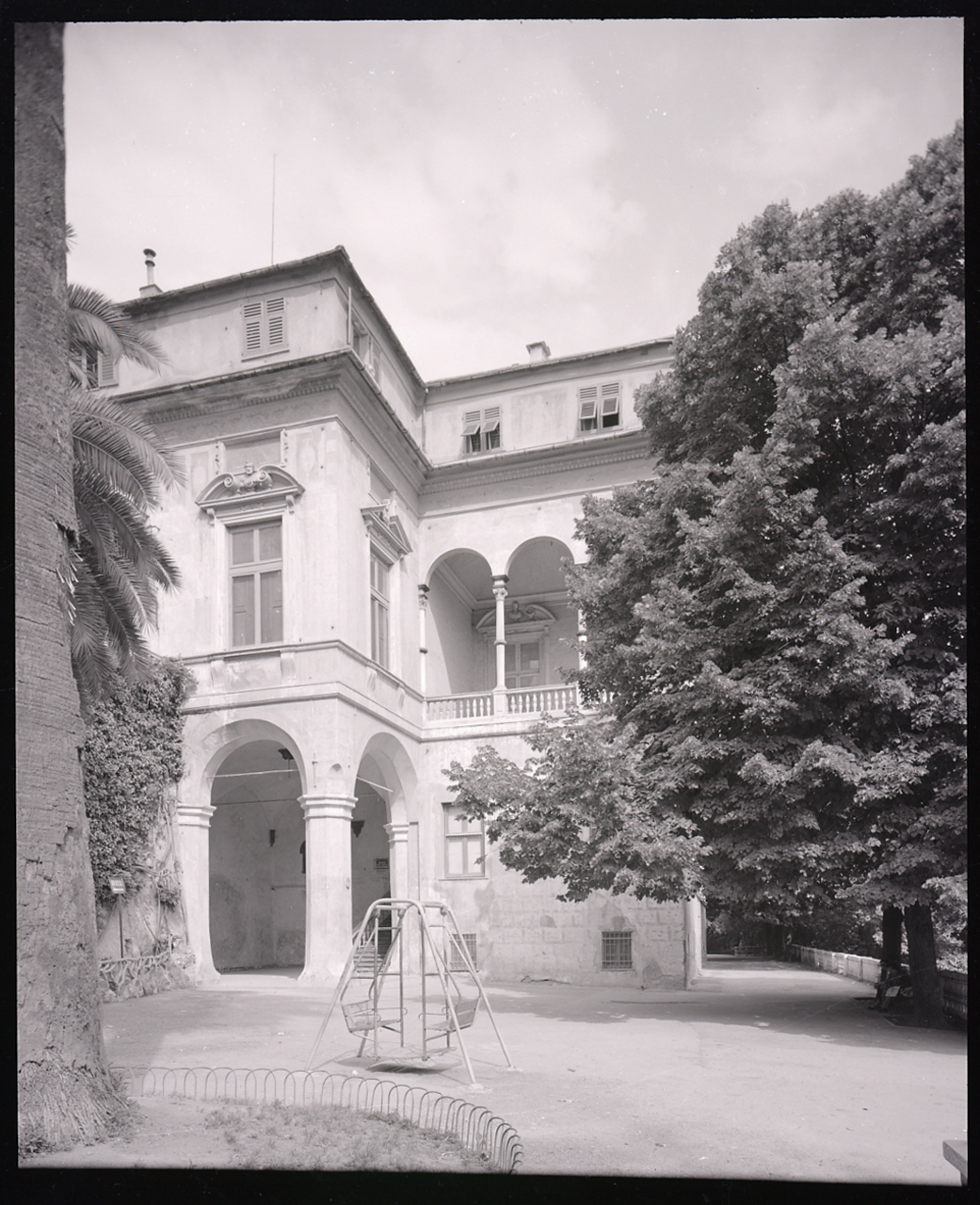 Val Bisagno. Genova. San Fruttuoso (quartiere). Villa Imperiale, ora del Comune. Biblioteca. Vista scorciata delle logge angolaricon colonne cerchiate e dal Giardino, ora Parco pubblico. Particolare decorazione di una finestra. Servizio fotografico : Genova, 1963 / Paolo Monti. - Buste: 5, Fototipi: 5 : Negativo b/n, gelatina bromuro d'argento/ pellicola ; 10x12. - ((Serie costituita da 5 buste sciolte di negativi identificati con i nn.: 6229, 6230, 6231, 6232, 6236. - Il negativo identificato con il numero 46397 è stato realizzato per Zodiac. - Occasione: Documentazione per la pubblicazione: Italia Nostra (a cura di), "Le ville genovesi", catalogo della mostra, Genova 1962, Genova, Comune di Genova, 1967. - Fonte: Monografia di Italia Nostra (a cura di): Le ville genovesi, catalogo della mostra, Genova 1962, Genova, Comune di Genova (1967). - Fonte: Lettera di Paolo Monti: I. Carteggi/ Genova - Enrico (1963-1966), presso Archivio Paolo Monti. Camicia con documenti dattiloscritti e manoscritti vari relativi al lavoro eseguito per Italia Nostra: preventivi, lettere, inventari. - Fonte: Rubrica di Paolo Monti: Archivio fino 1-4-1961/ 31-3-1963 (1961-1963), presso Archivio Paolo Monti. - Fonte: Agenda di Paolo Monti: R 1 - Monti/ 1 aprile 1963 - 6 giugno 1964/ 6000-8193 (1963-1964), presso Archivio Paolo Monti